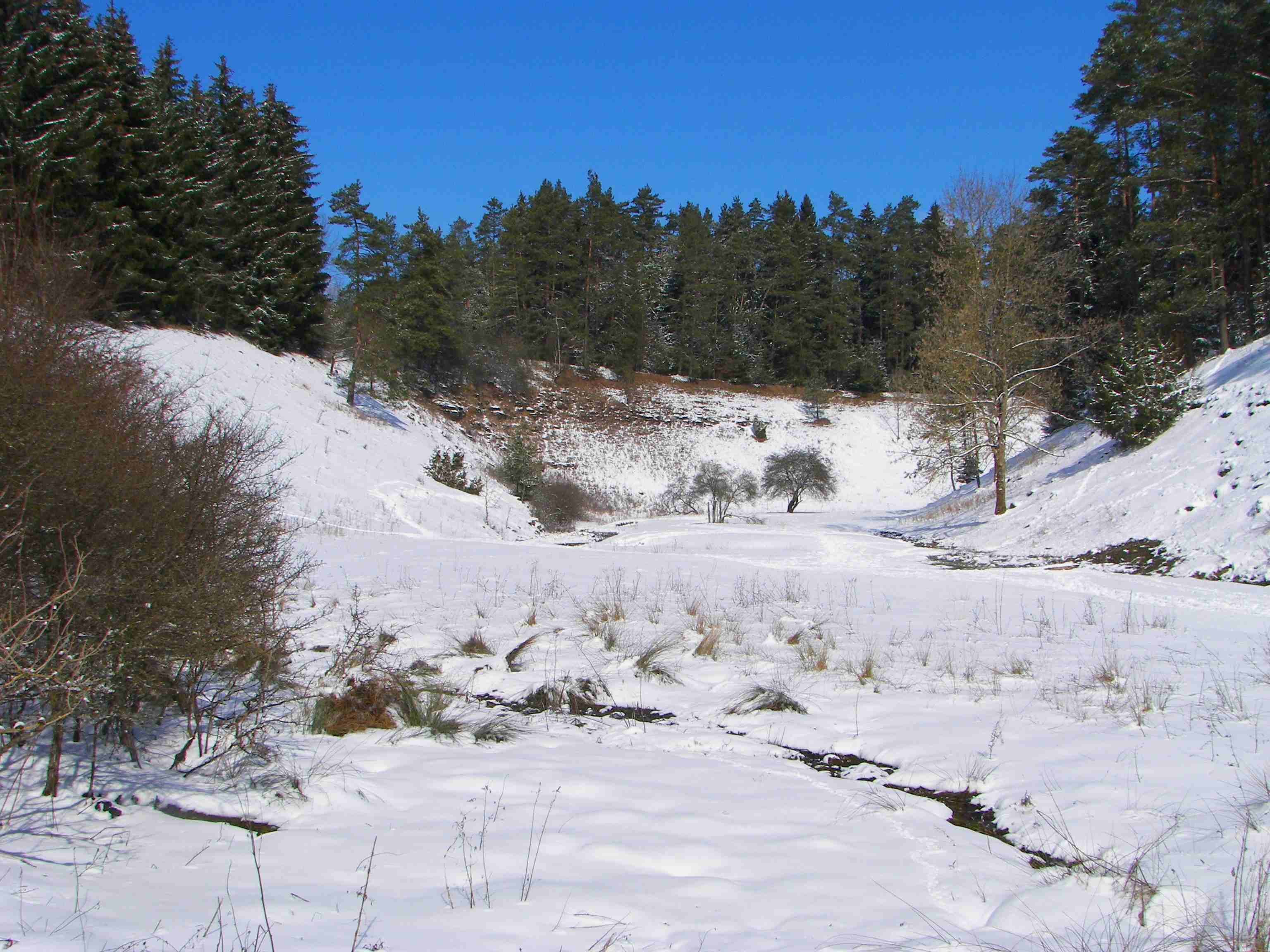 Das Leinleitertal ist ein Trockental, das nur noch zeitweise über ein Fließgewässer verfügt